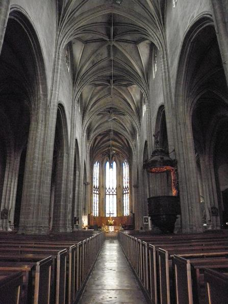 Intérieur de la co-cathédrale N.D. de Bourg-en-Bresse